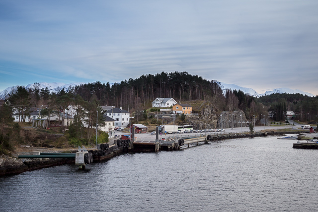 Gjermundshavn fergekai